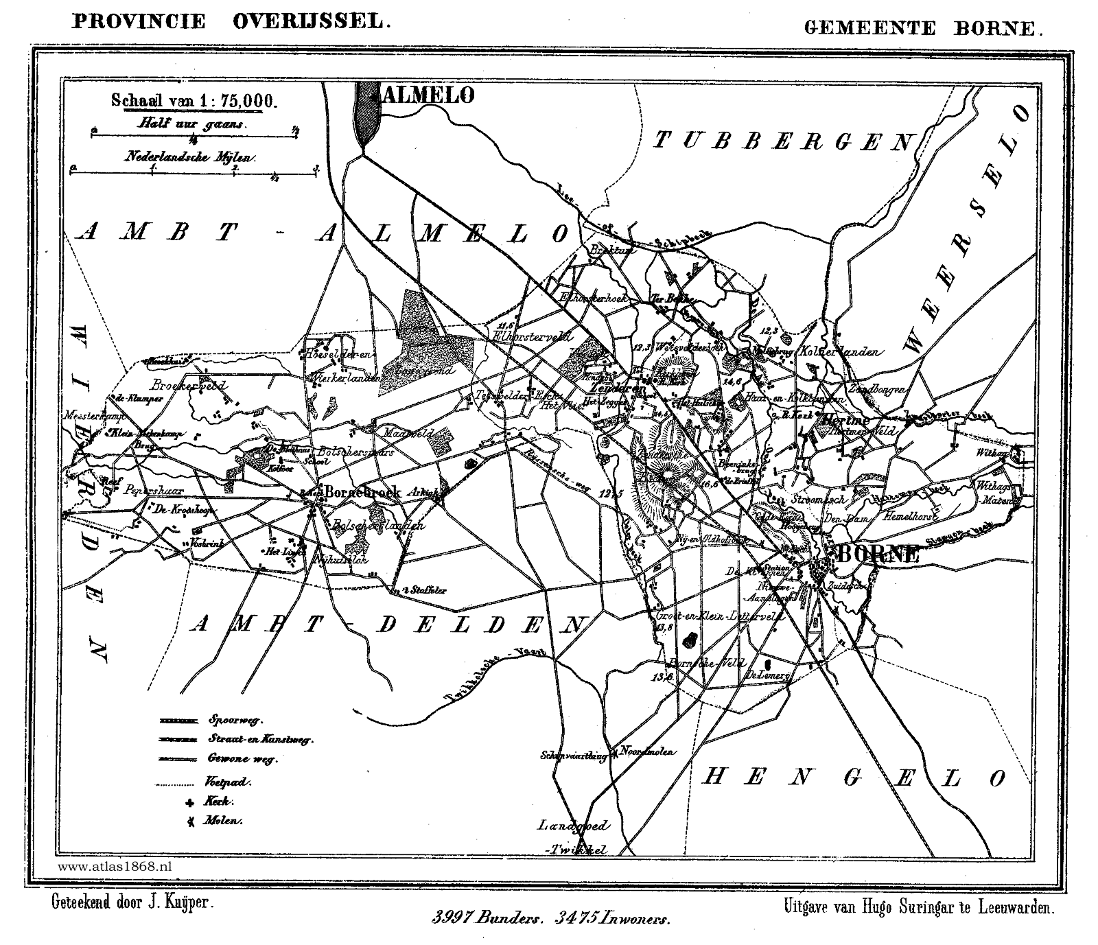 Kaart van Borne (Overijssel) uit Gemeente Atlas van Nederland, J. Kuyper 1865-1870, Uitgave Hugo Suringar Leeuwarden.